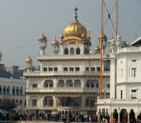 Akal Takht Kultaisen Temppelin kompleksissa